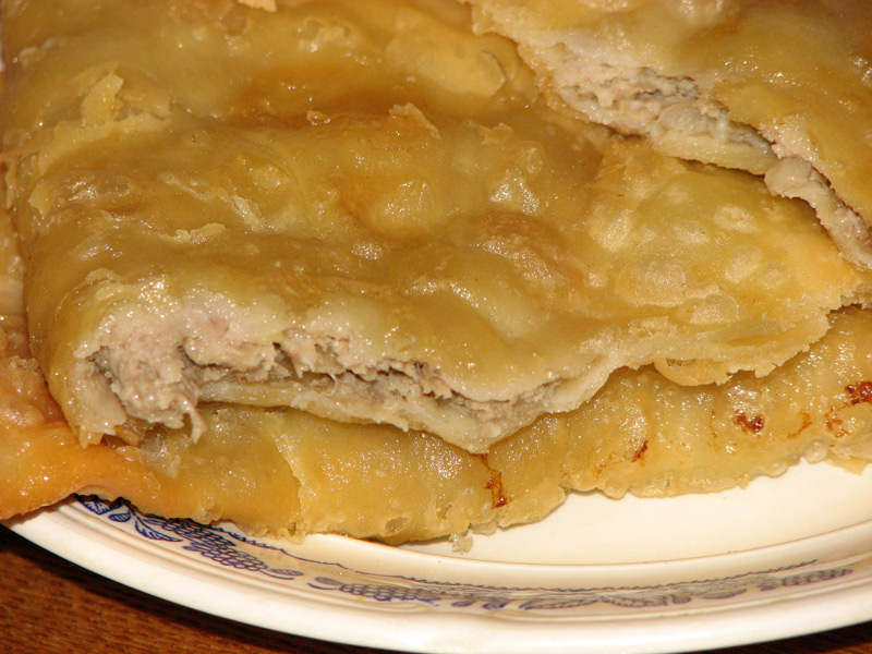 Чебурек